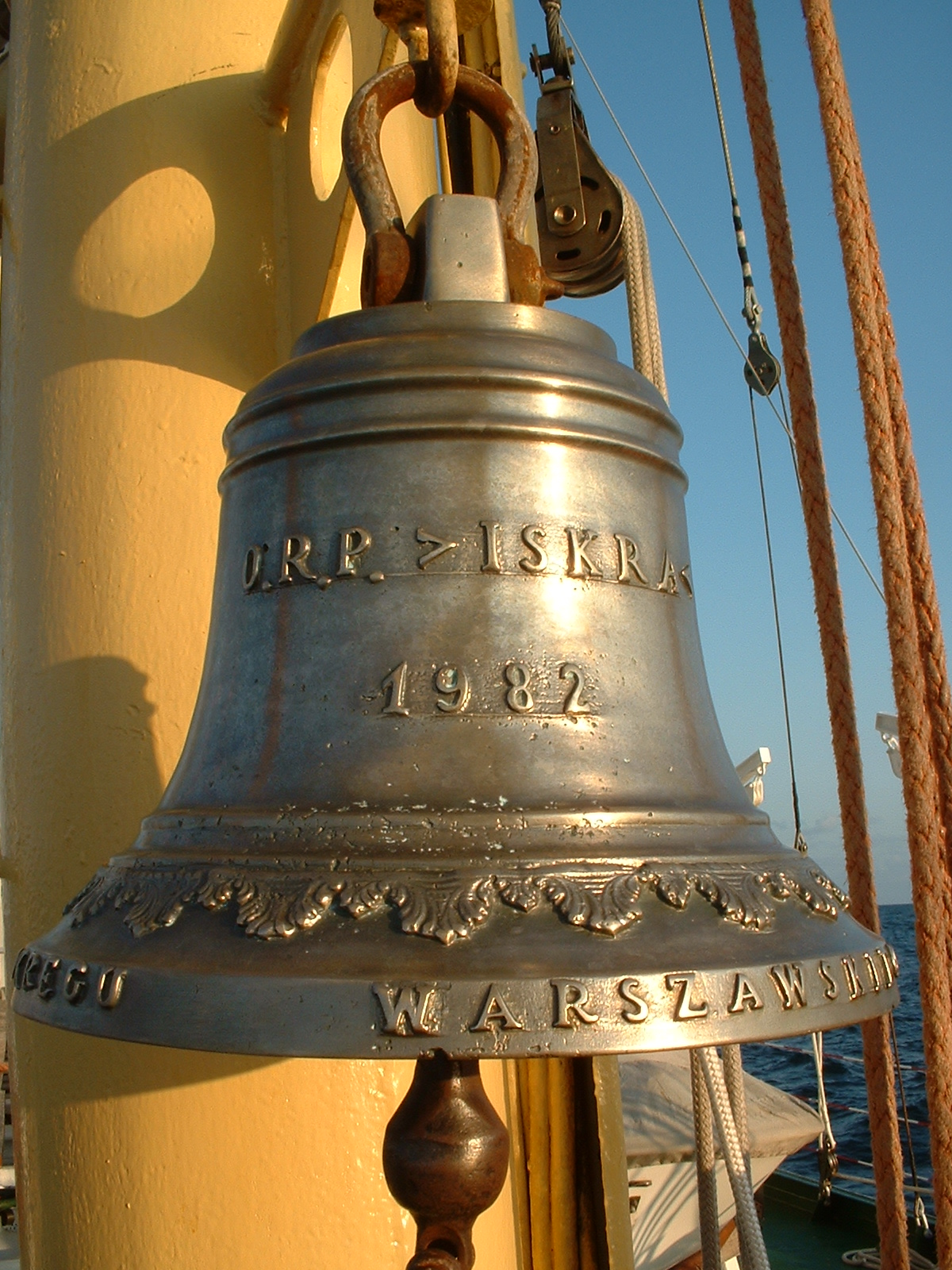 Dzwon ORP Iskra 2